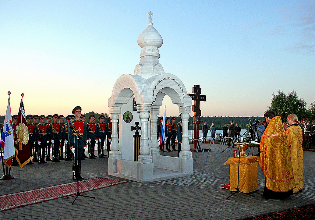 На берегу Невы открыли часовню памяти воинов Великой Отечественной войны.